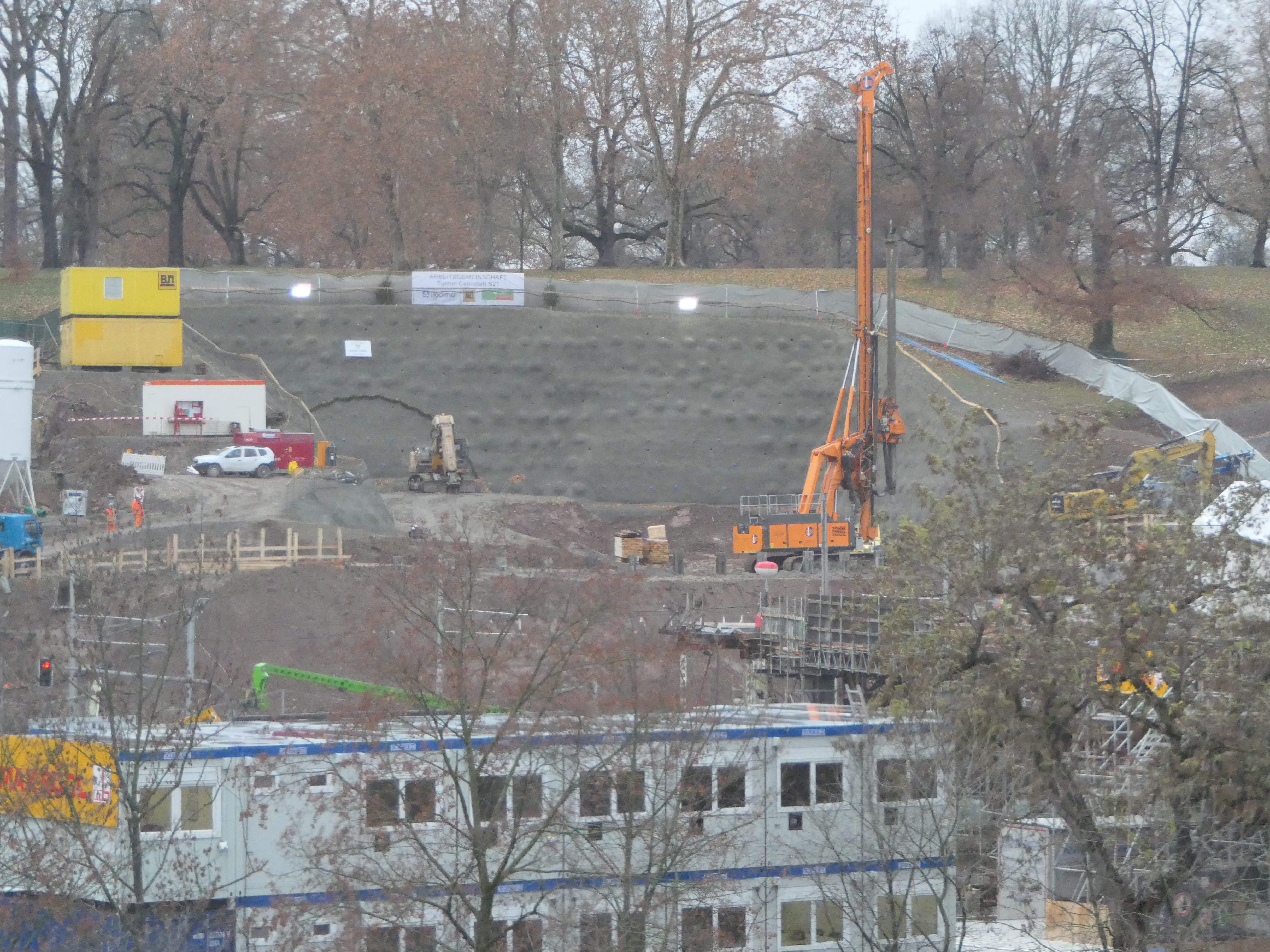 Das Tunnelportal für den Rosensteintunnel in Stuttgart, im Rahmen vom Bahnprojekt Stuttgart-Ulm.